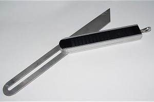 Zweihaak of zwaaihaak - eigen foto